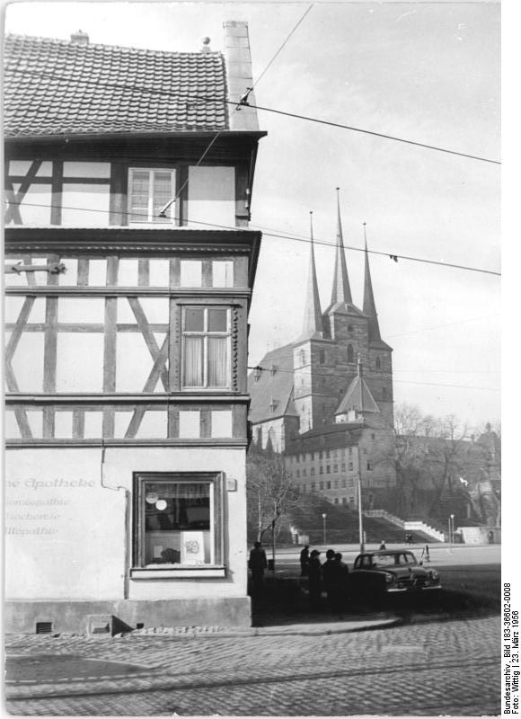 Erfurt, "Grüne Apotheke", Severi-Kirche Zentralbild Erfurt-Wittig-23.3.1956 Bn-Th- Die grüne Apotheke am Domplatz mit Blick auf die Domstufen und Severi-Kirche.